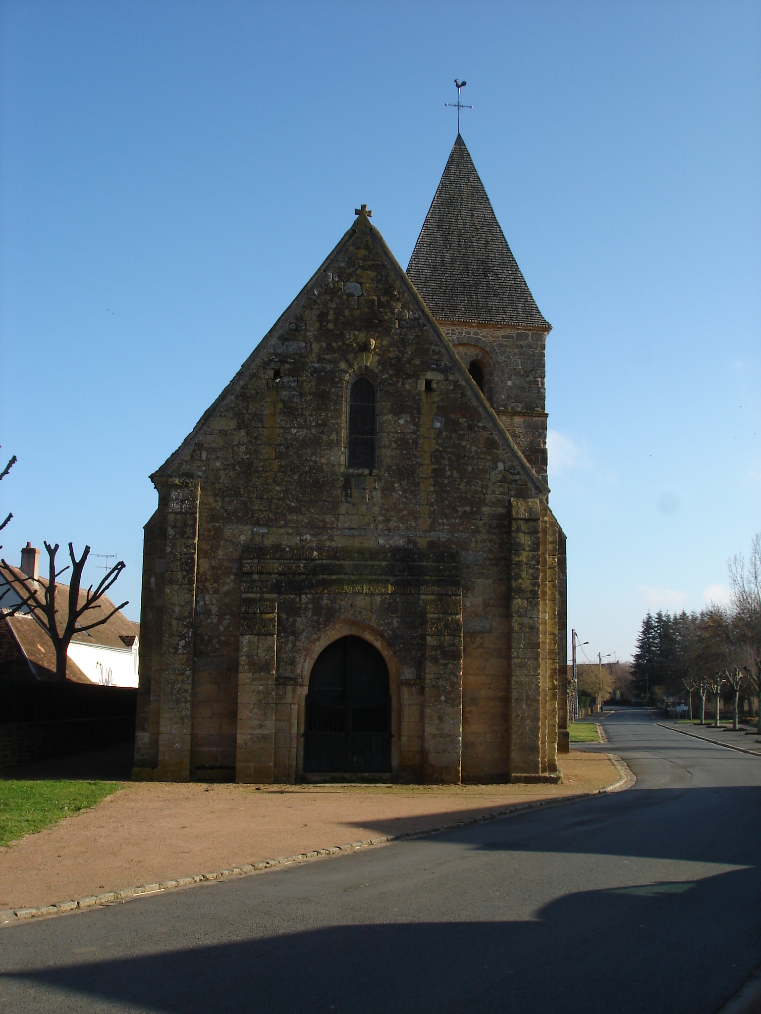 Lacs (36) : L'église Saint-Martin.